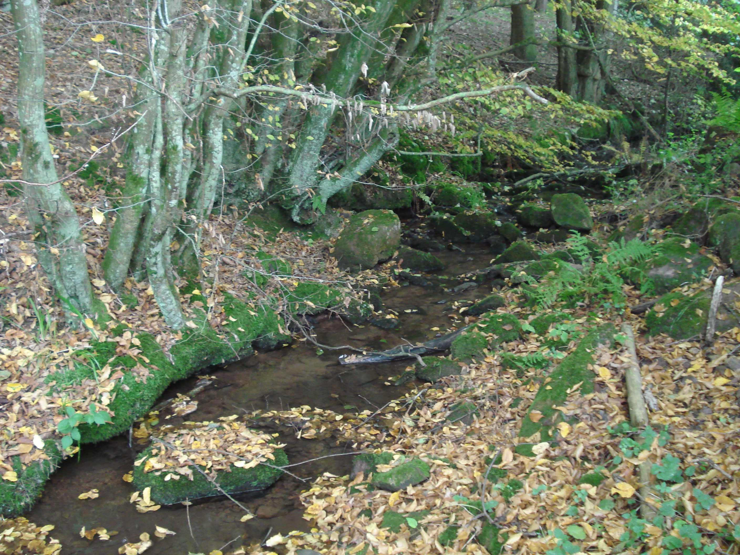 Der Winterbach vor Hettigenbeuern